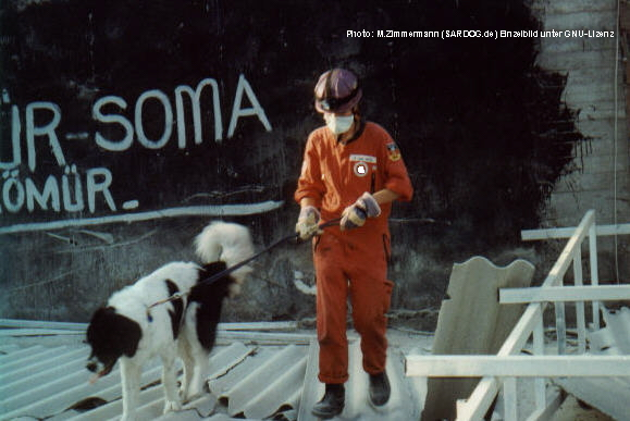 Rettungshundeteam (Johanniter-Unfall-Hilfe e.V) im Türkeieinsatz 1999, durch den gezeigten Rettungshund (Landseerhündin) wurden wenige Minuten vor der Aufnahme 2 Kinder lebend angezeigt (5 Tage nach dem Beben). Sie konnten 15 Stunden später, relativ unverletzt, gerettet werden. (Erdbeben am 17. August 1999, Sakarya, rund 30 Kilometer nordöstlich von Izmit)